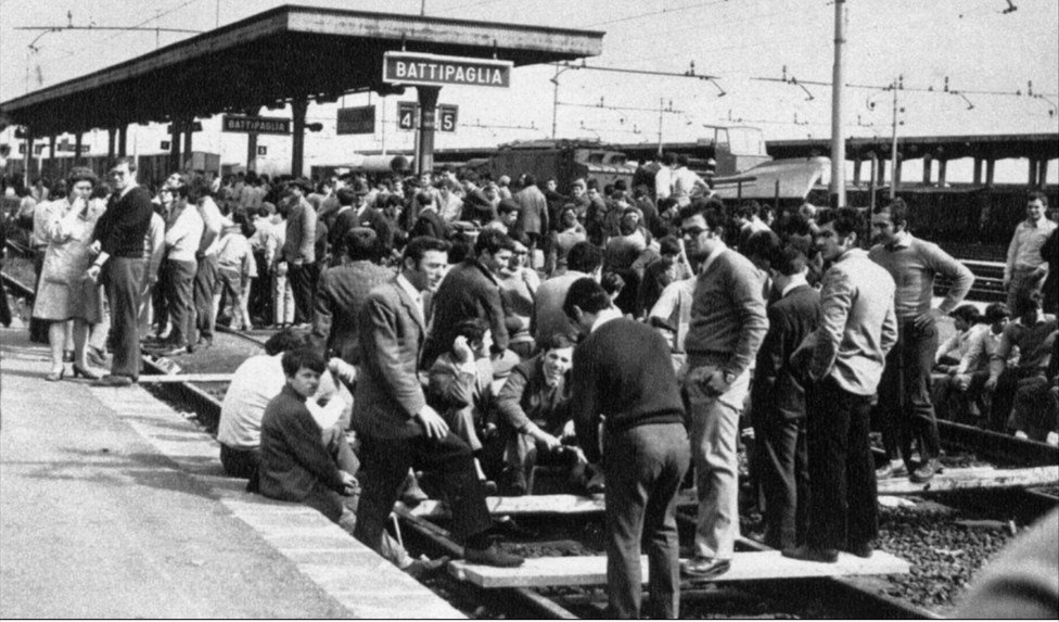 Stazione di Battipaglia - Manifestanti bloccano linea ferroviaria (9 aprile 1969)